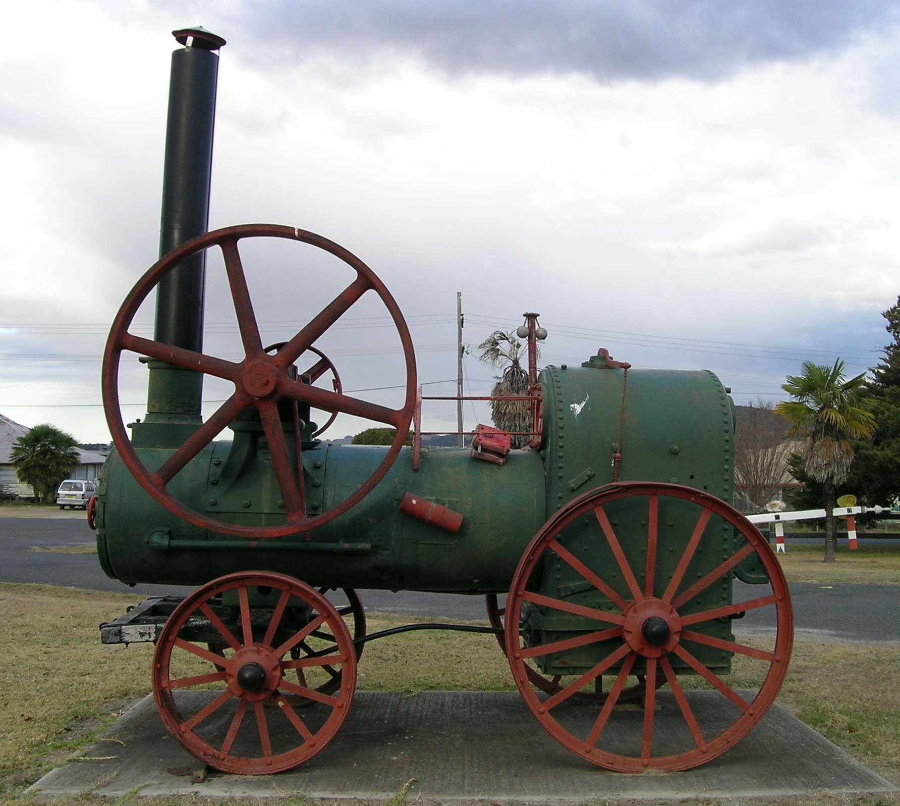 Steam engine, museum, Tentefield, NSW